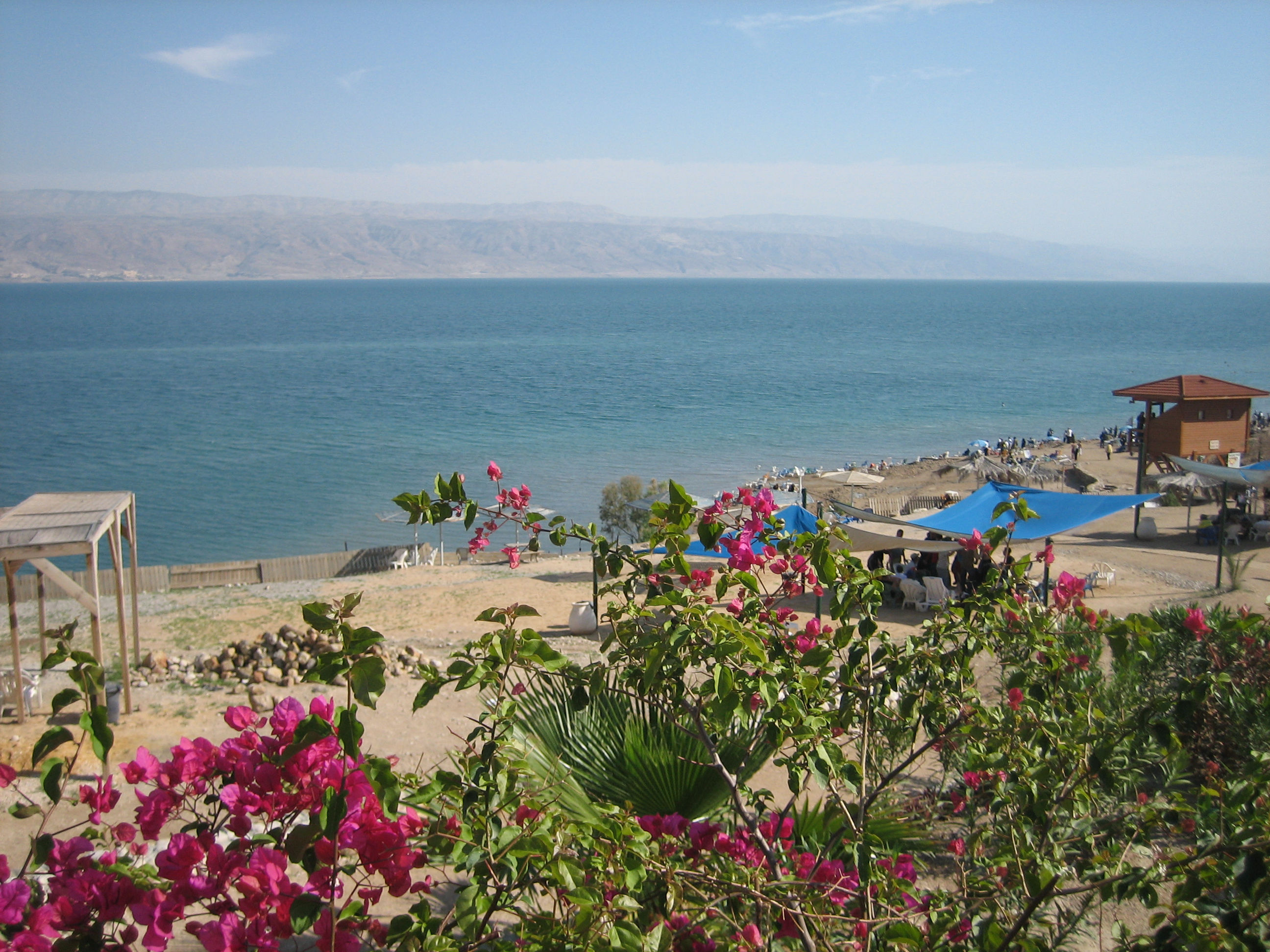 Dead Sea "Qalya" beach, Israel / Plaža „Kalija“ na Mrtvom moru, Izrael